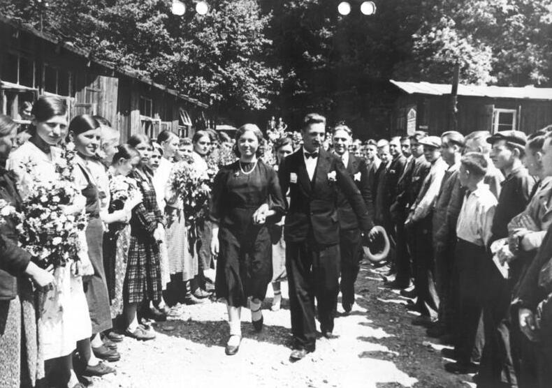 Vorbildliche Fürsorge der Arbeiter des Ostlandes durch die DAF. Ostarbeiter, die im Zuge des Arbeitseinsatzes nach Deutschland gekommen sind um ihre Arbeitskraft dem Reich zur Verfügung zu stellen und hier von den Dienststellen der DAF betreut wurden, sind in grossen Lagern zusammengefaßt worden. Die DAF hat ihnen den Aufenthalt im Deutschen Reich, den Eigenarten ihres Landes entsprechend gestaltet und hat für menschenwürdige Wohnstätten, für eine Feierabendgestaltung und viele andere soziale Einrichtungen gesorgt. UBz: Hochzeit im Ostarbeiterlager. Ein großer Tag - nicht nur für das Brautpaar - sondern auch für die Zuschauer